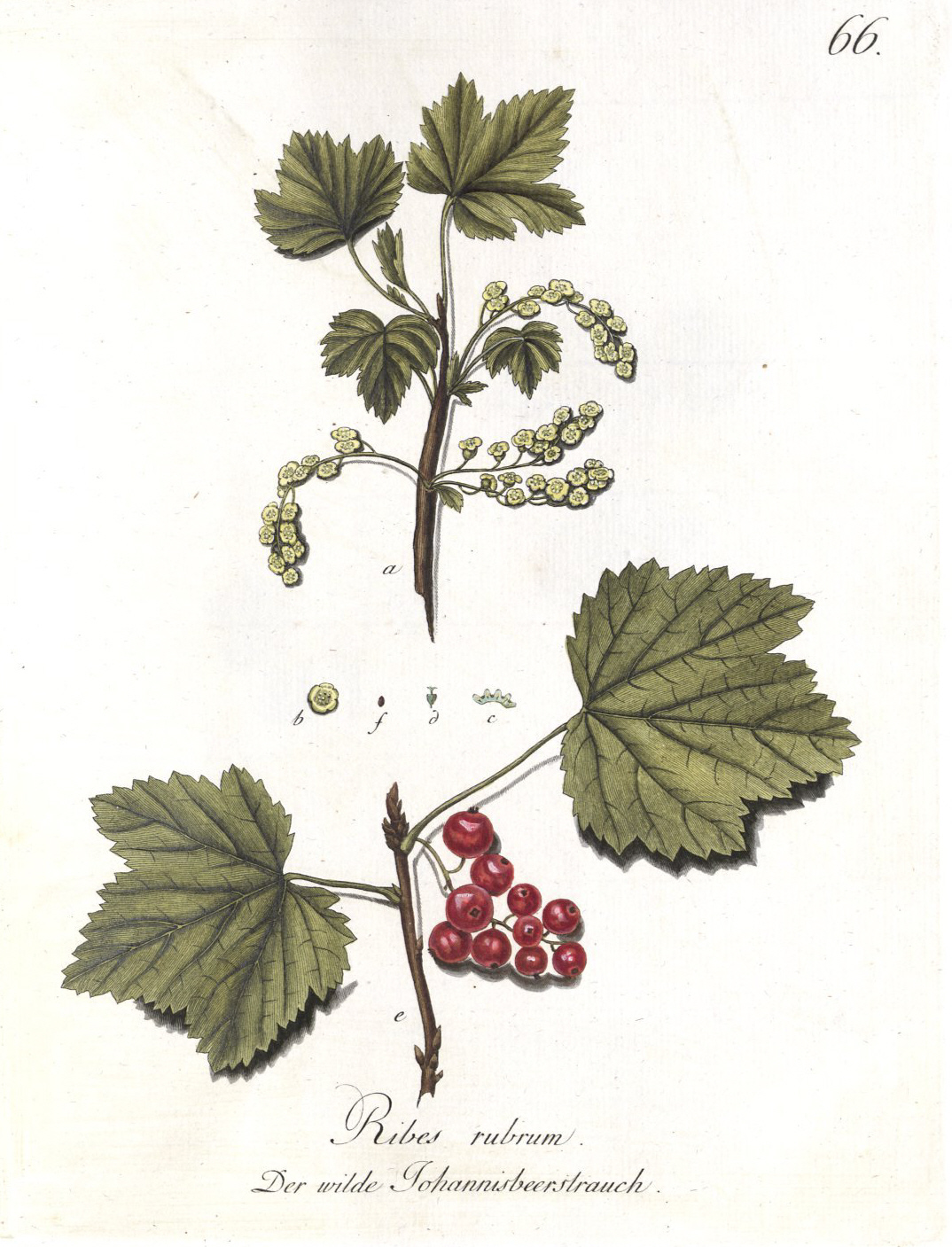 Abbildung Der Hundert Deutschen Wilden Holz-Arten Nach Dem Nummern-Verzeichnis Im Forst-Handbuch Von F. A. L. Von Burgsdorf; Tafel: Der wilde Johannisbeerstrauch (Ribes rubrum) Johannisträublen Erklärung